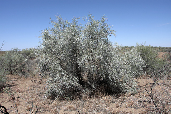 Ammodendron Conollyi